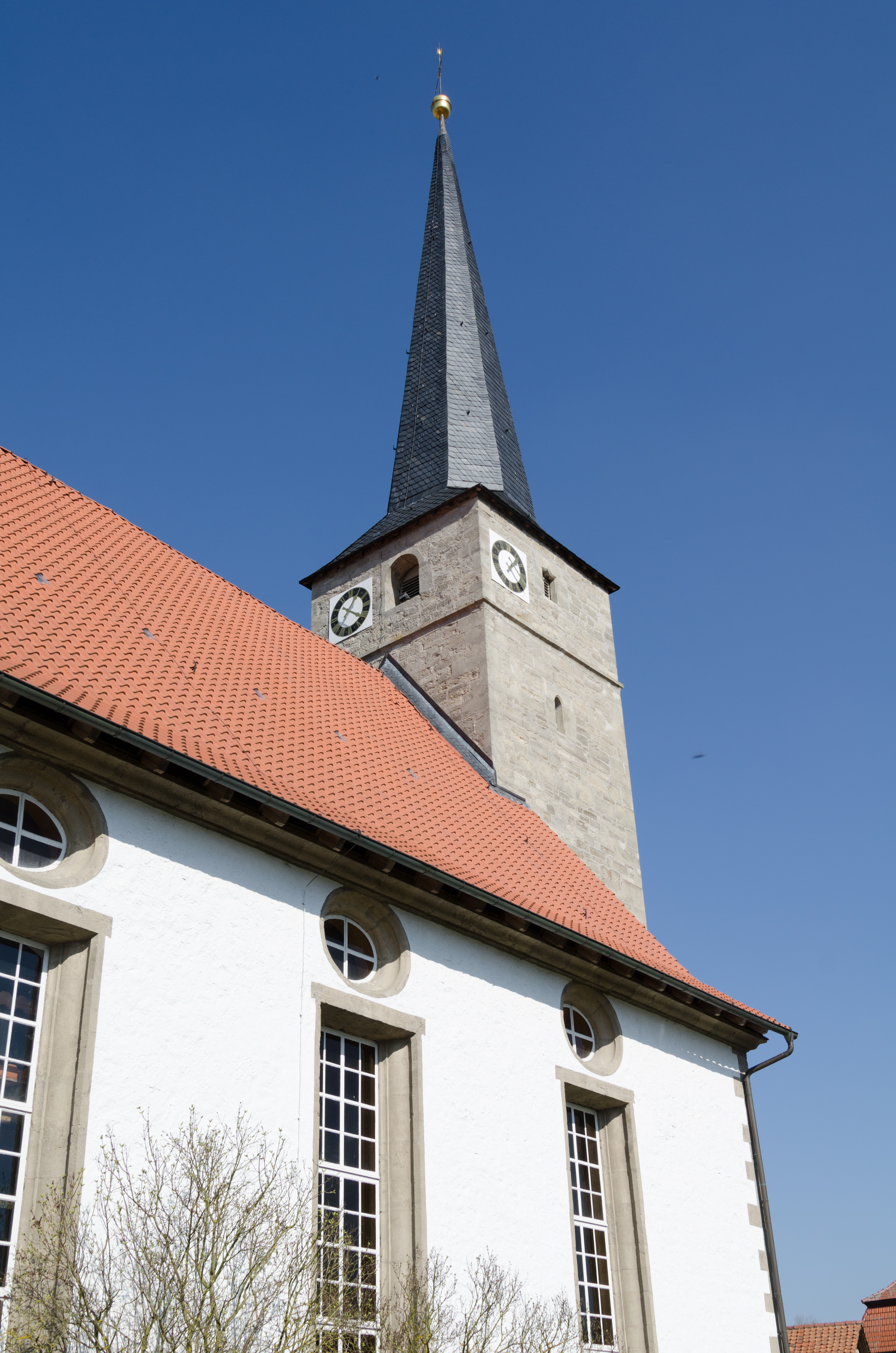 Vachdorf, Kirchenburganlage